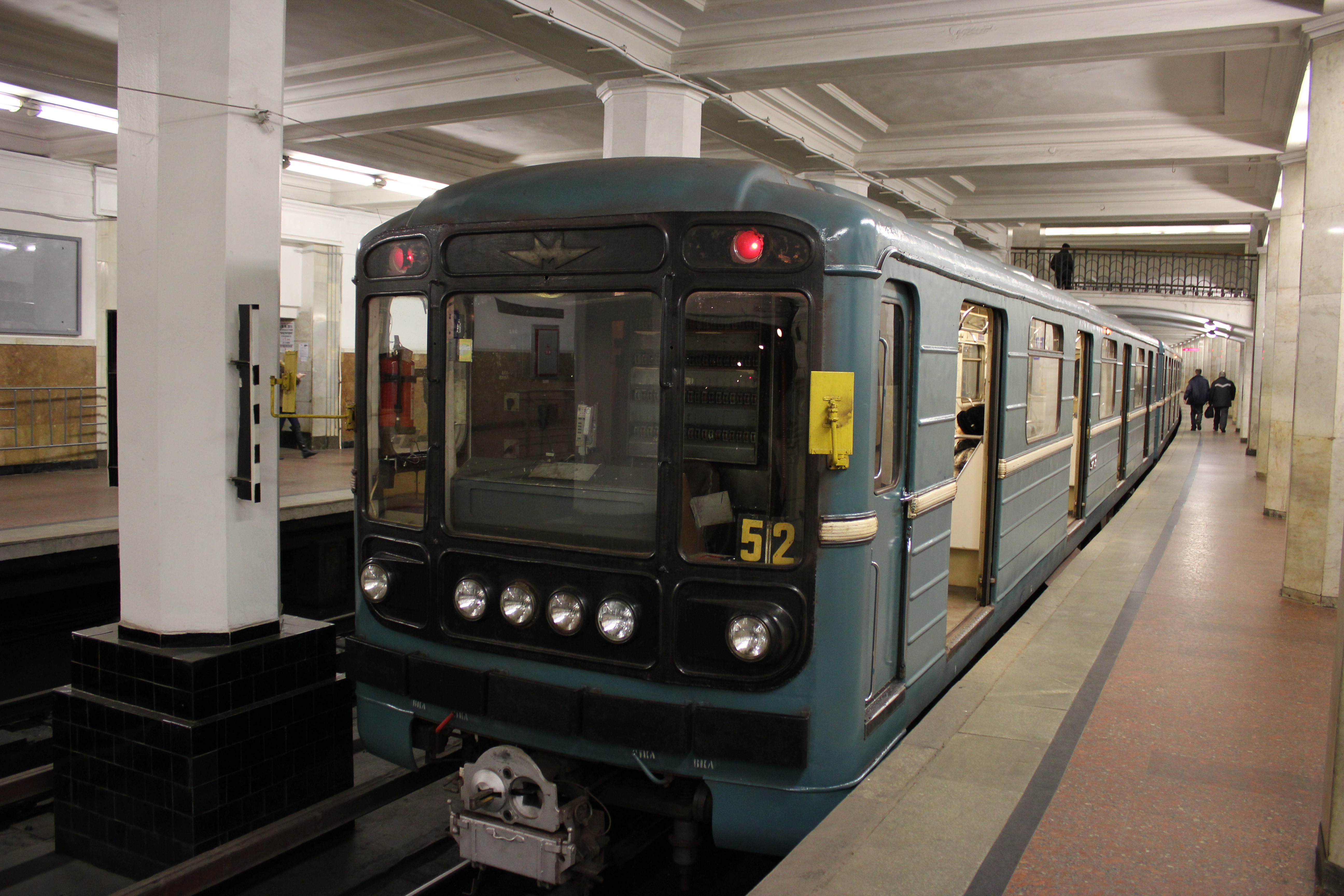 Metro car type 81-717 at Aleksandrovsky sad station.